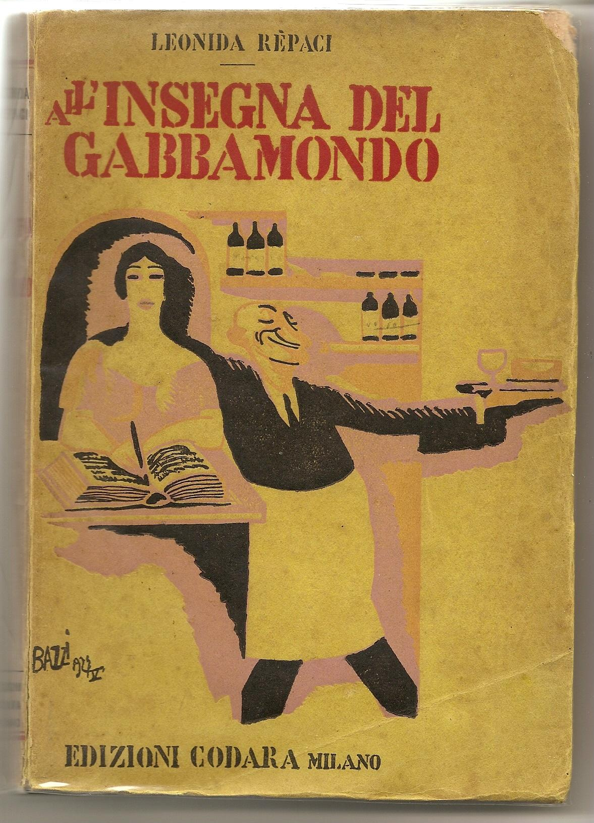 Leonida Repaci, All'insegna del gabbamondo. Codara 1928